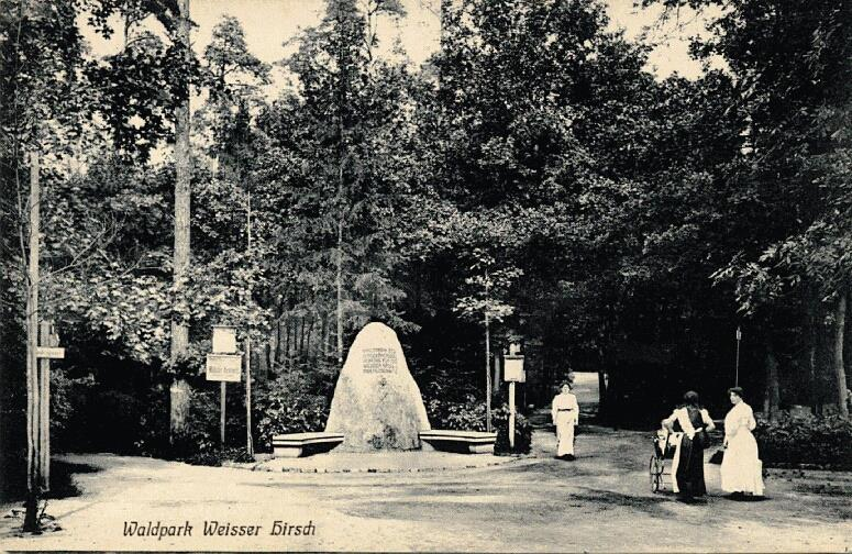 Waldpark Weißer Hirsch, Dresden, 1910